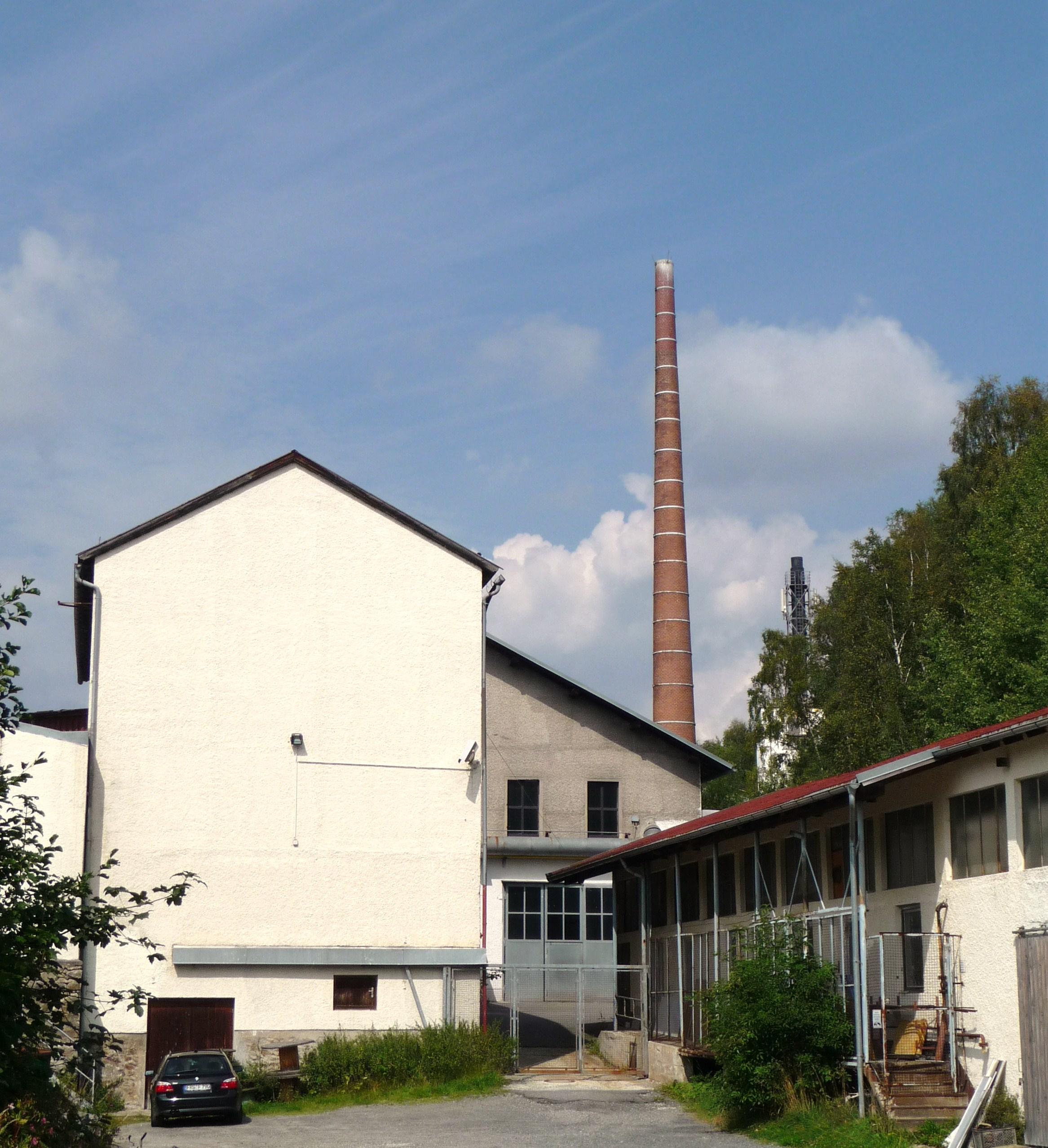 Die Kristallglasfabrik Spiegelau